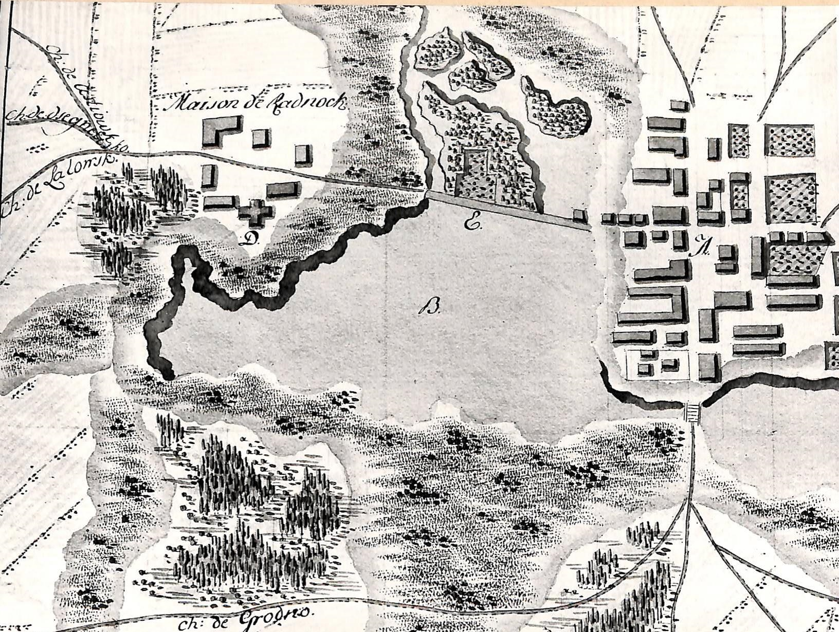 Беларуская (тарашкевіца): Заблудаў (Zabłudaŭ), сядзіба Радзівілаў (Radzivił). Плян